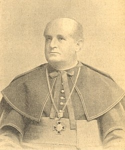 Adolf Rodler (1843 - 1912), Český a rakouský římskokatolický kněz, publicista a politik.